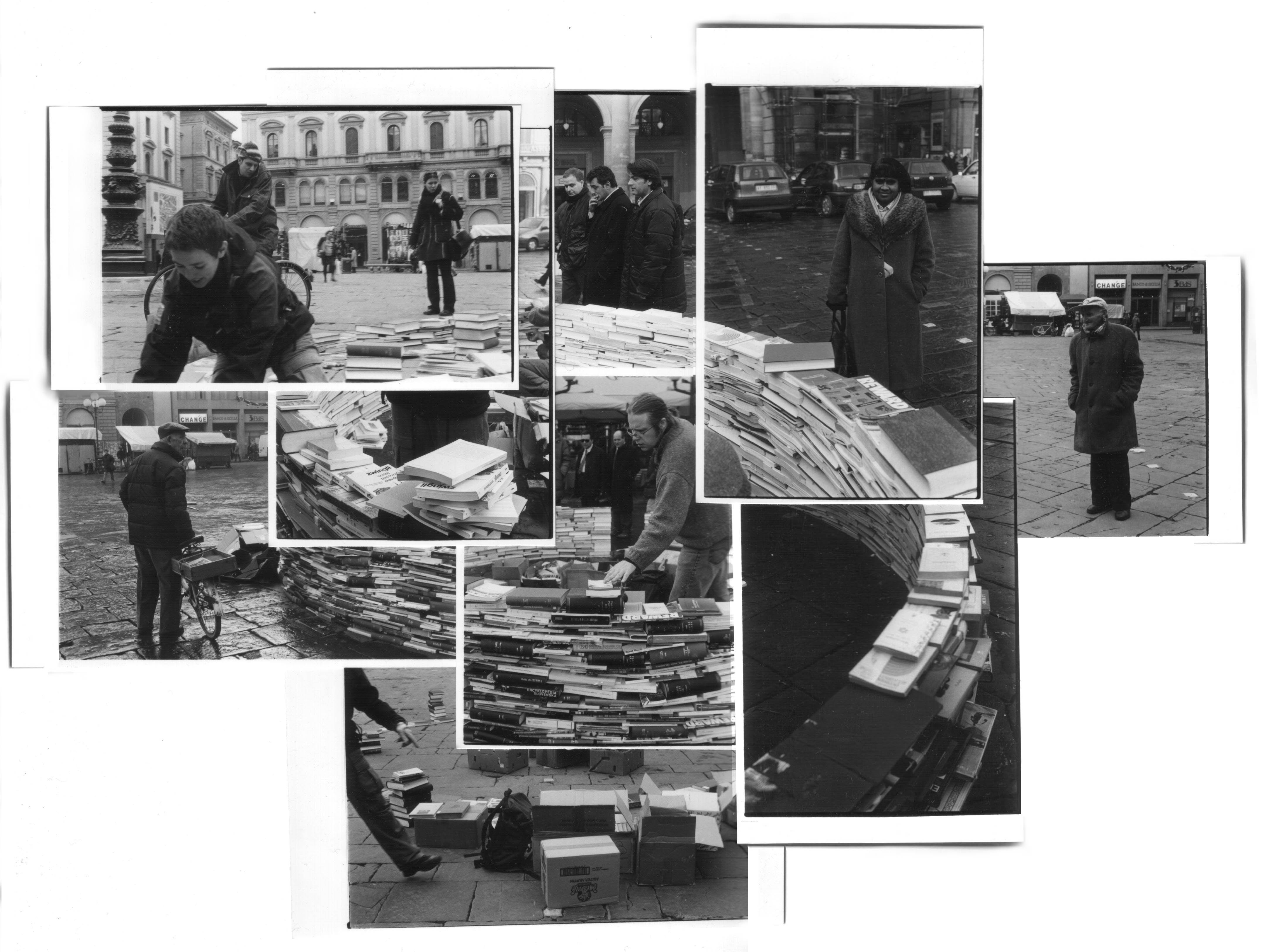 Casagrande & Rintala: Installation 1:2001, photo collage: Nathalie Pozzi, Firenze Biennale 2001